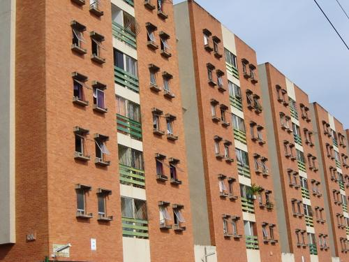 Vista de um conjunto residencial em Guará - DF.